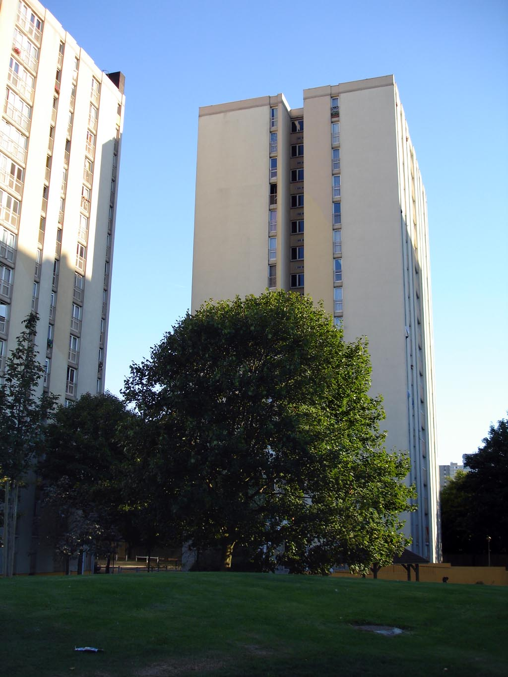 Cité Paul-Vaillant-Couturier à Bobigny (Seine-Saint-Denis), France